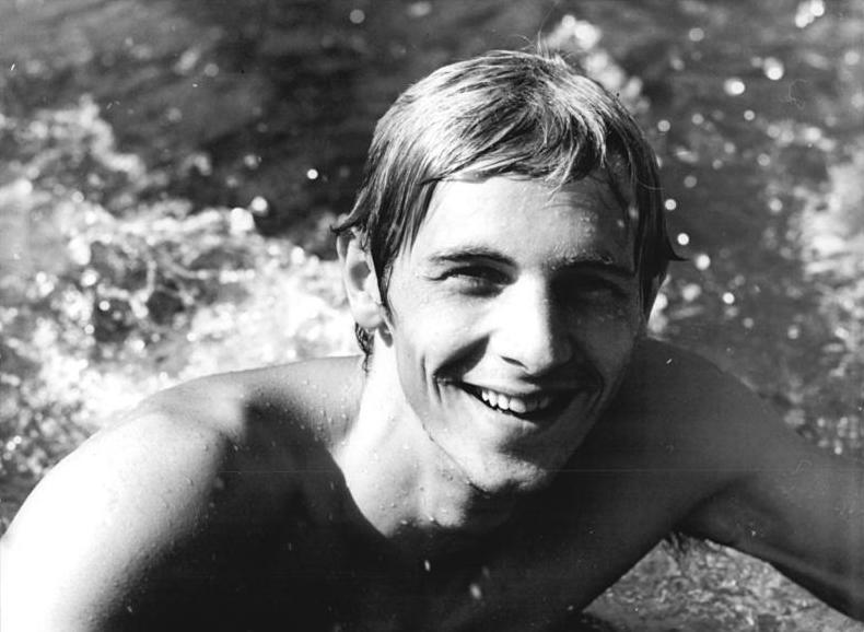 Klaus Katzur ADN-ZB Mittelstädt 10-7-71-Rostock:XXIV.DDR-Meisterschaften im Sportschwimmen (3.Tag)-Brustschwimmer Klaus Katzur (ASK Vorwärts Rostock) ist zuversichtlich. Beim Finale über 200 m Brust der Herren hofft er seinen 15.DDR-Meistertitel zu erkämpfen. Bisher brachte er es auf fünf Einzel- und neun Staffelsiege.